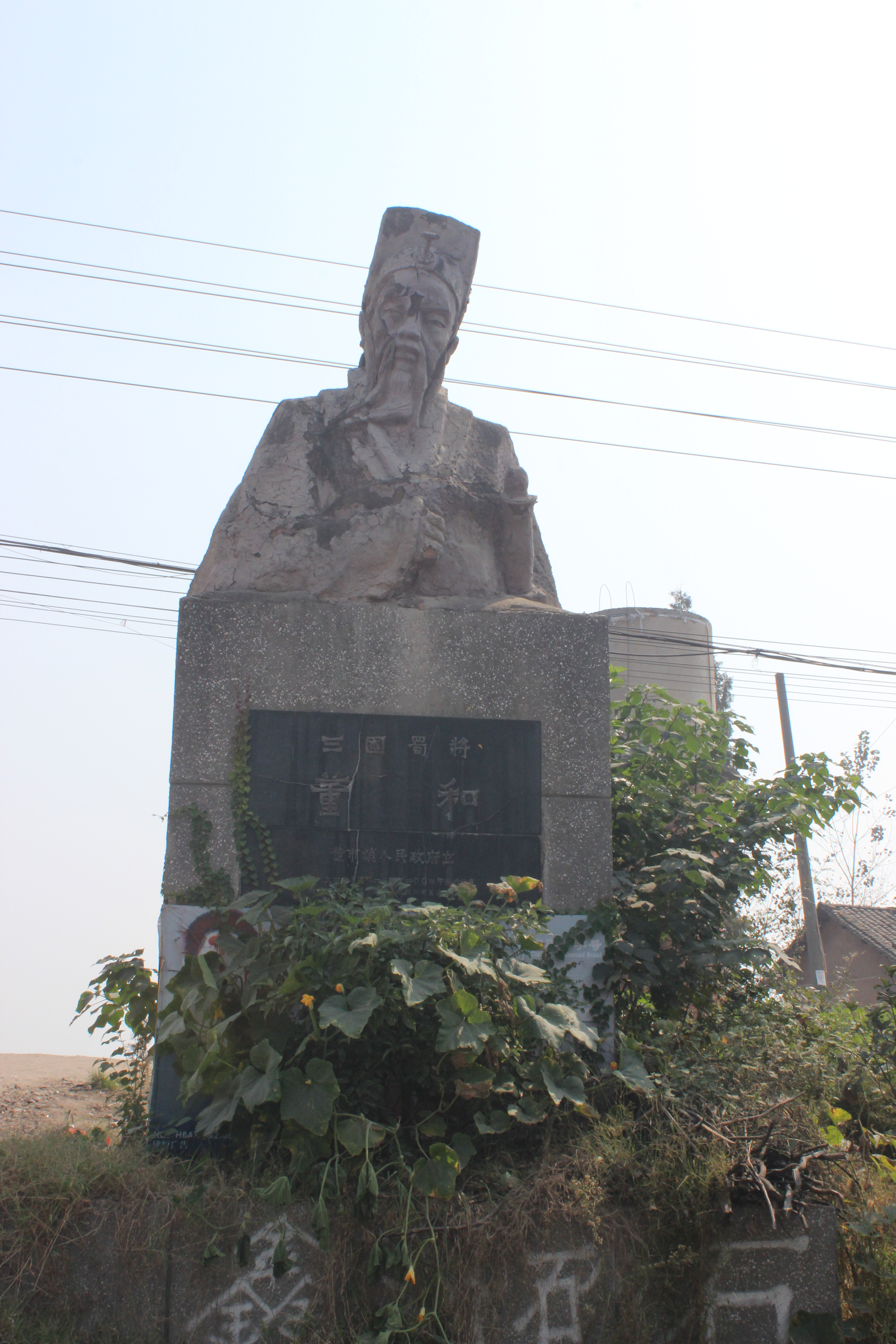 人物生平 编辑 治理郡县 董和 董和[2] 董和字幼宰，是南郡枝江人。他的祖上本是巴郡江州人。东汉末年，董和率领家族西迁。 后来，他先后被益州牧刘璋任命为为牛鞞（bǐng）、江原县长及成都县令。蜀地物产丰富，当时风气盛行奢侈，经商之家，穿戴如同王侯，饮食玉液琼浆，到婚娶丧葬时，几乎倾尽家财来铺张办理。董和以自身的行为节俭来为众人做出表率，粗衣素食，处处以符合礼制为行为准则，当地奢侈风气于是大为改变，大家都对其心存存畏惧而不敢冒犯。 县里的一些豪强因害怕董和的严厉，于是鼓动刘璋调任董和为巴东属国都尉。但没想到成都县中的官吏百姓扶老携幼挽留董和的有几千人，刘璋只好让董和留任两年，再转升为益州郡太守，他在太守任上仍与过去一样清约节俭。他与周围少数民族打交道时，总是以诚心相待，故此深受南方少数民族的信任和爱戴。[3] 清贫俭约 公元214年（建安十九年），刘备平定益州后，征召董和为掌军中郎将，与军师将军诸葛亮共同主持管理左将军、大司马府的事务，他们出谋划策，共事欢洽交情深厚。自从董和居官食禄以来，对外治理安抚边疆少数民族，在内参与军国大事，二十多年，临终时家中竟然没有一石粮食的私财